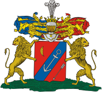 Герб из Общего гербовника дворянских родов Российской империи